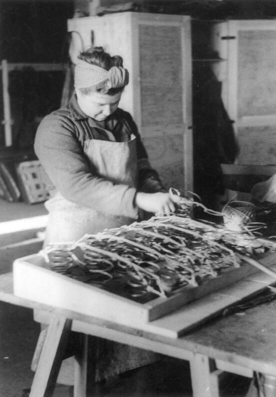 Scherl Bilderdienst: Das Ende der Autofriedhöfe. Freiwillige aus dem Osten, Ostarbeiter u. Ostarbeiterinnen arbeiten in einem Karftfahr-Instandsetzungswerk der Wehrmacht, in welchem aus dem Material unbrauchbarer Autos, neue Wagen am laufenden Band hergestellt werden. In der Polster- und Sattlerwerkstatt arbeiten vornehmlich Frauen aus Weißruthenien. [Berlin] 19.1.45 Bildberichter: Pips Plenik